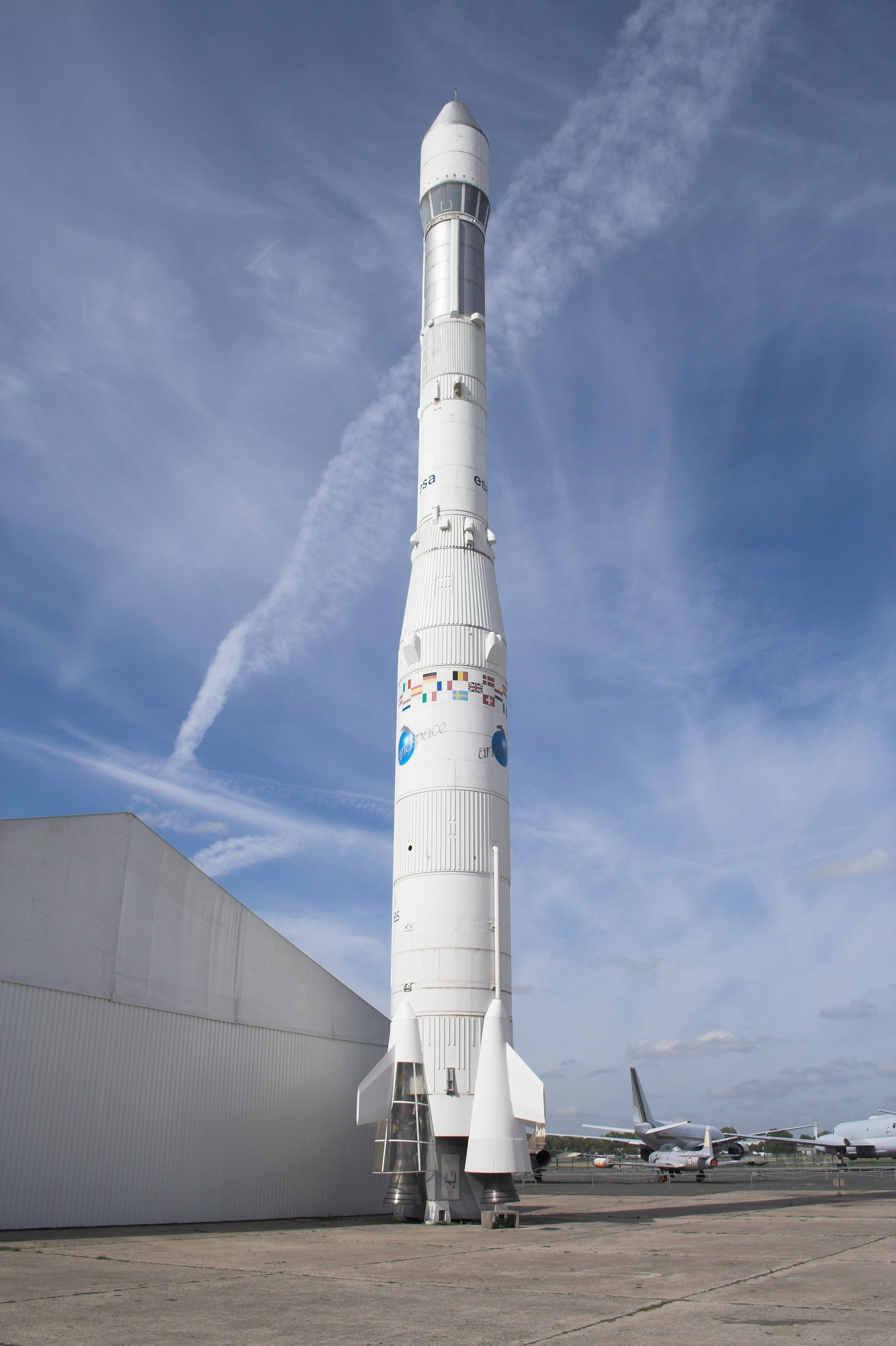 A model of an European rocket Ariane 1 in the Museum of Air and Space (Musée de l'air et de l'espace, Le Bourget, France)